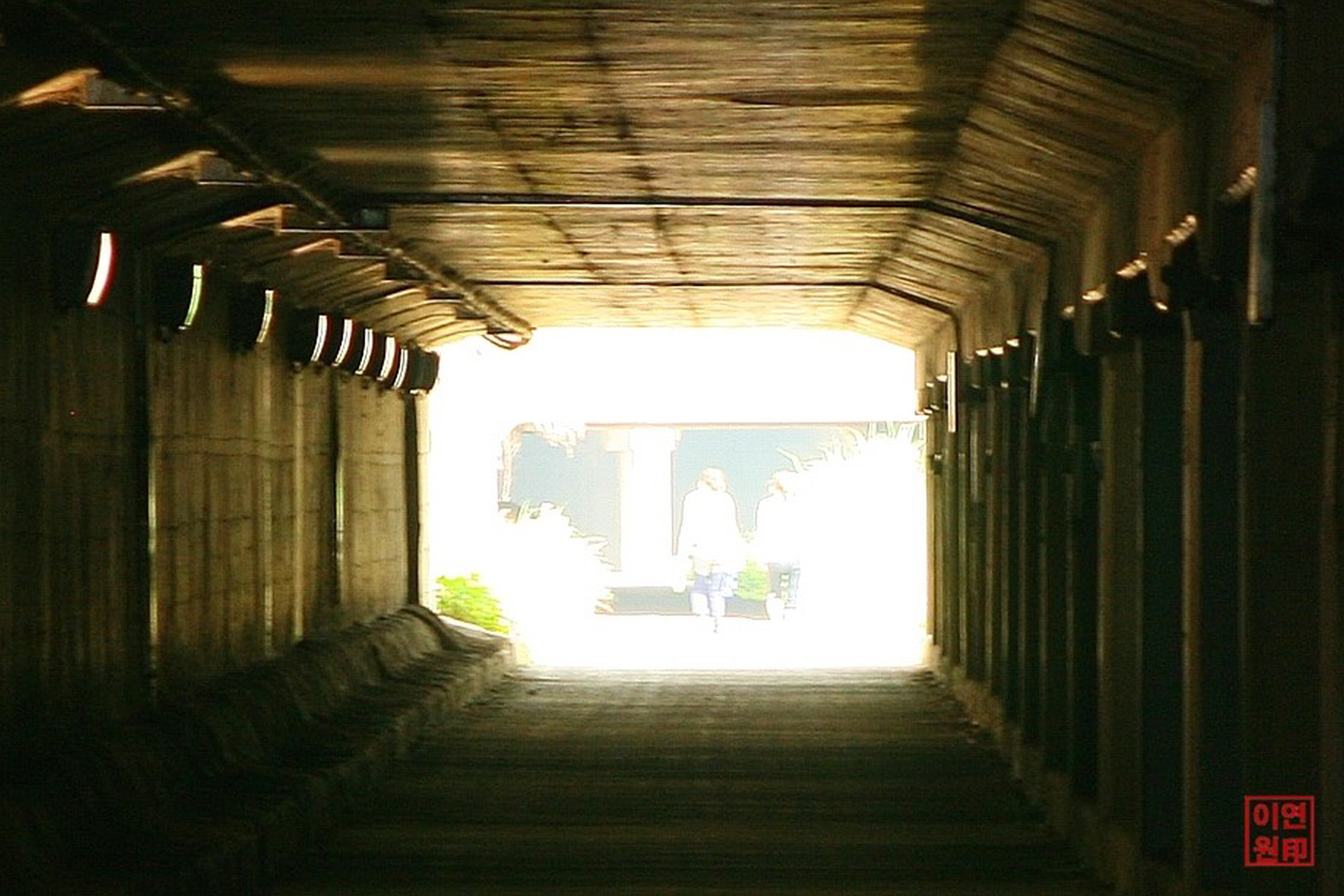 여의천[염곡천(연내천)] 양재나들목